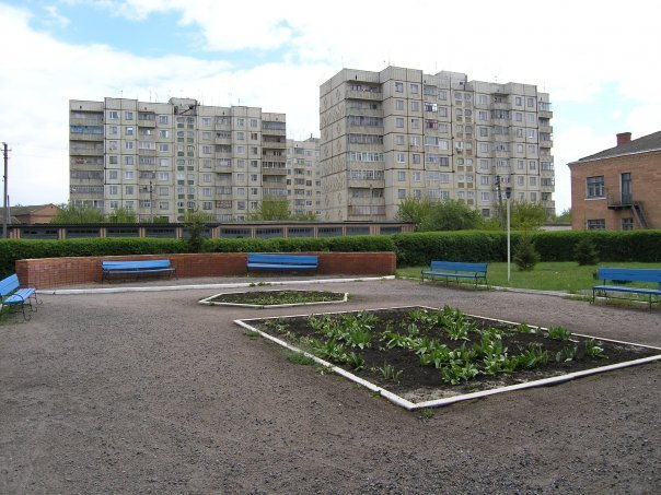 Фото